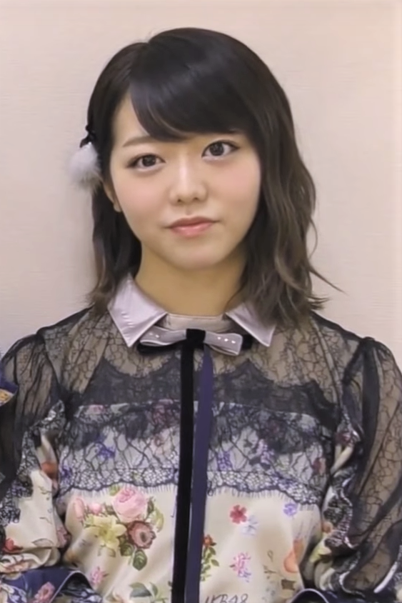 AKB48 Group大前輩 #柏木由紀 #指原莉乃 #峯岸みなみ來將經驗分享給TPE48參賽女孩們，呼籲大家要繼續支持喜歡的女孩喔！